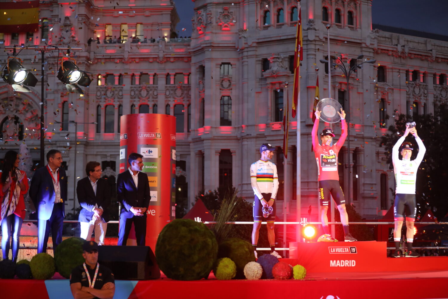 Tras 21 etapas, Primoz Roglic se ha declarado vencedor de la 74ª edición de la vuelta 15/09/2019 El alcalde de Madrid, José Luis Martínez-Almeida, ha entregado el primer premio de La Vuelta Ciclista a España 2019 a Primoz Roglic, en el podio situado en Cibeles.